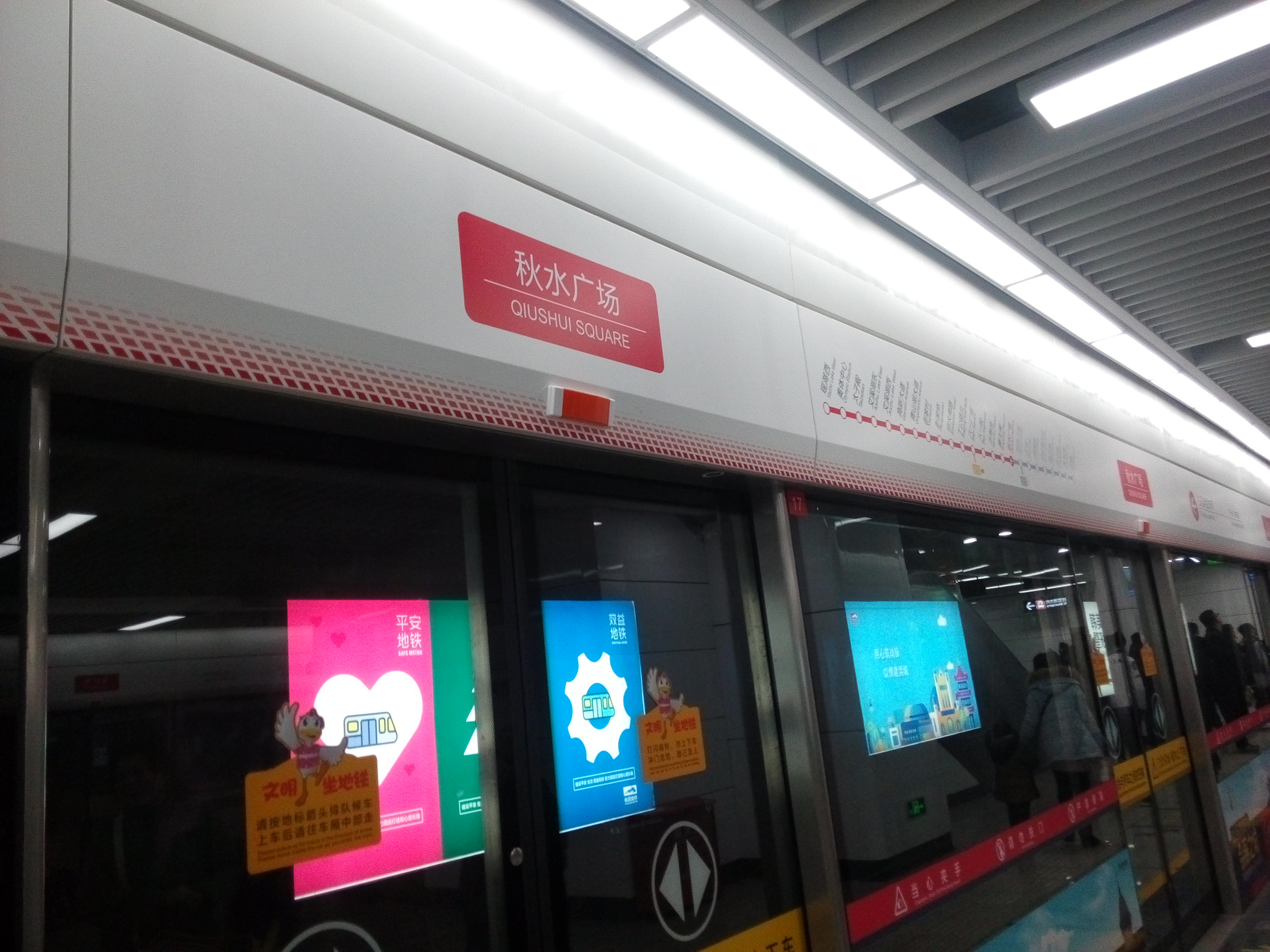 秋水广场站站台屏蔽门